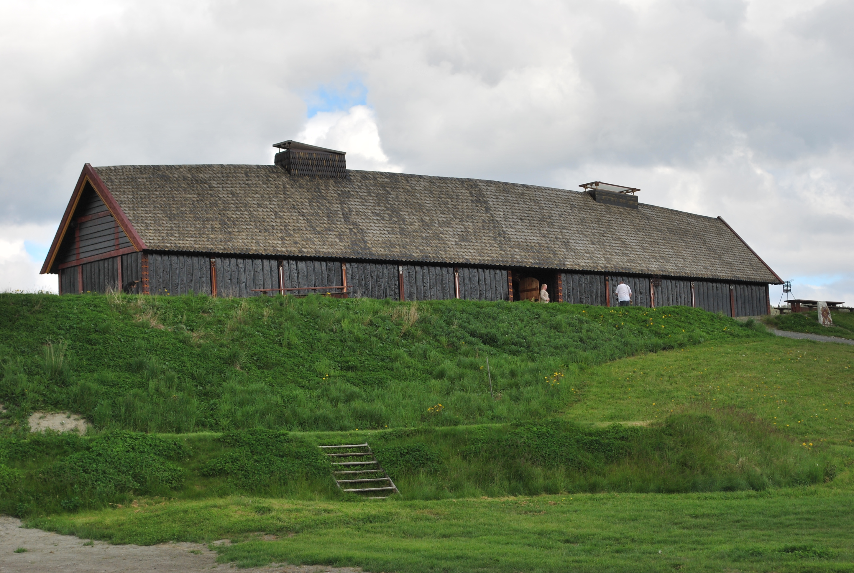 Langhuset på middelaldergården Stiklastadir - en del av Stiklestad Nasjonale Kultursenter